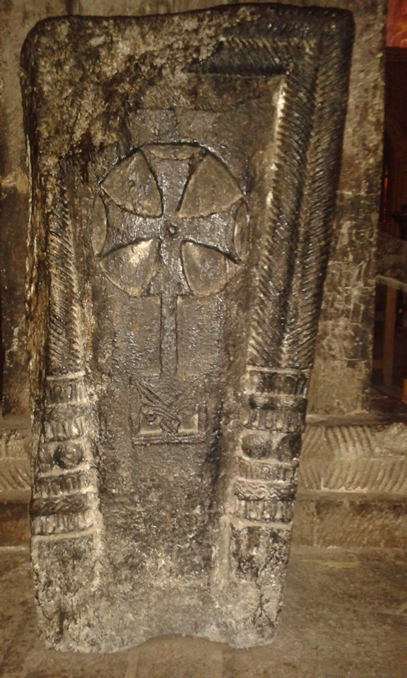 ქვის სტელა ბოლნური ჯვრით ვალეს ღვთისმშობლის ეკლესიაში